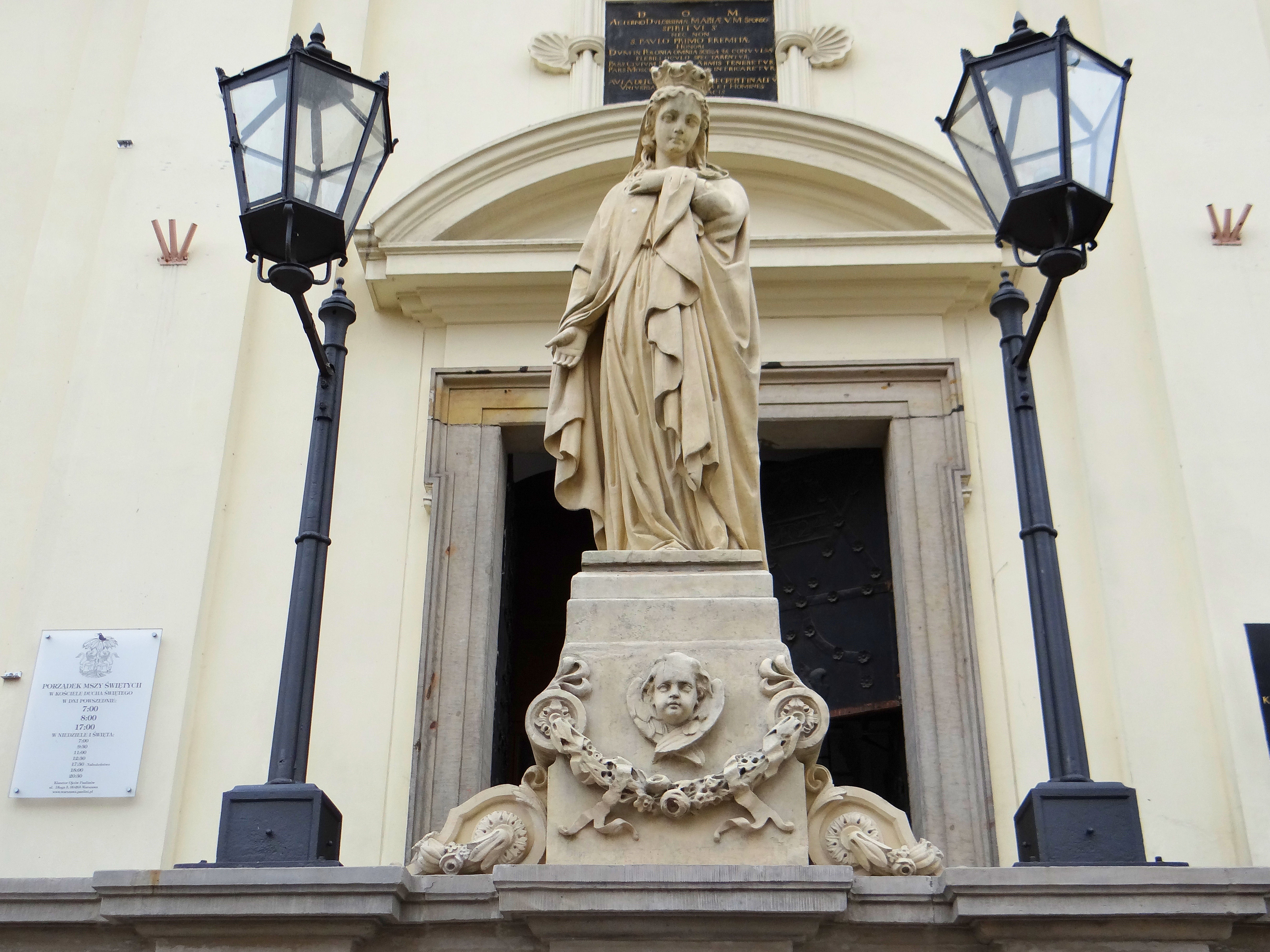 Kościół p.w. Świętego Ducha w Warszawie - figura Matki Bożej przy wejściu głównym